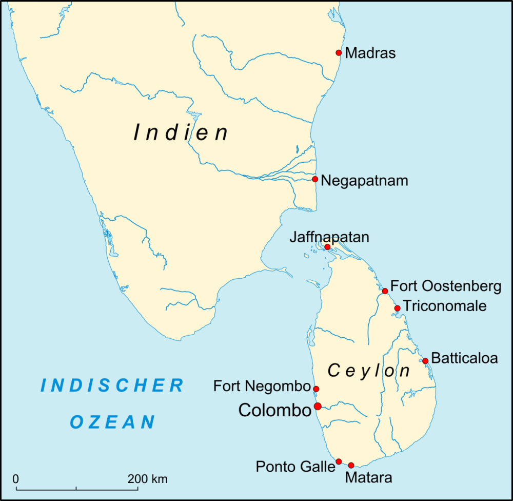 Stützpunkte des Kapregiments in Ceylon und Indien zwischen 1791-1796